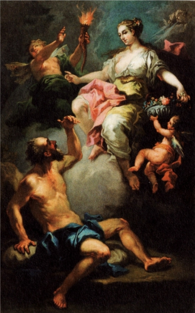 Mythologisches Gemälde